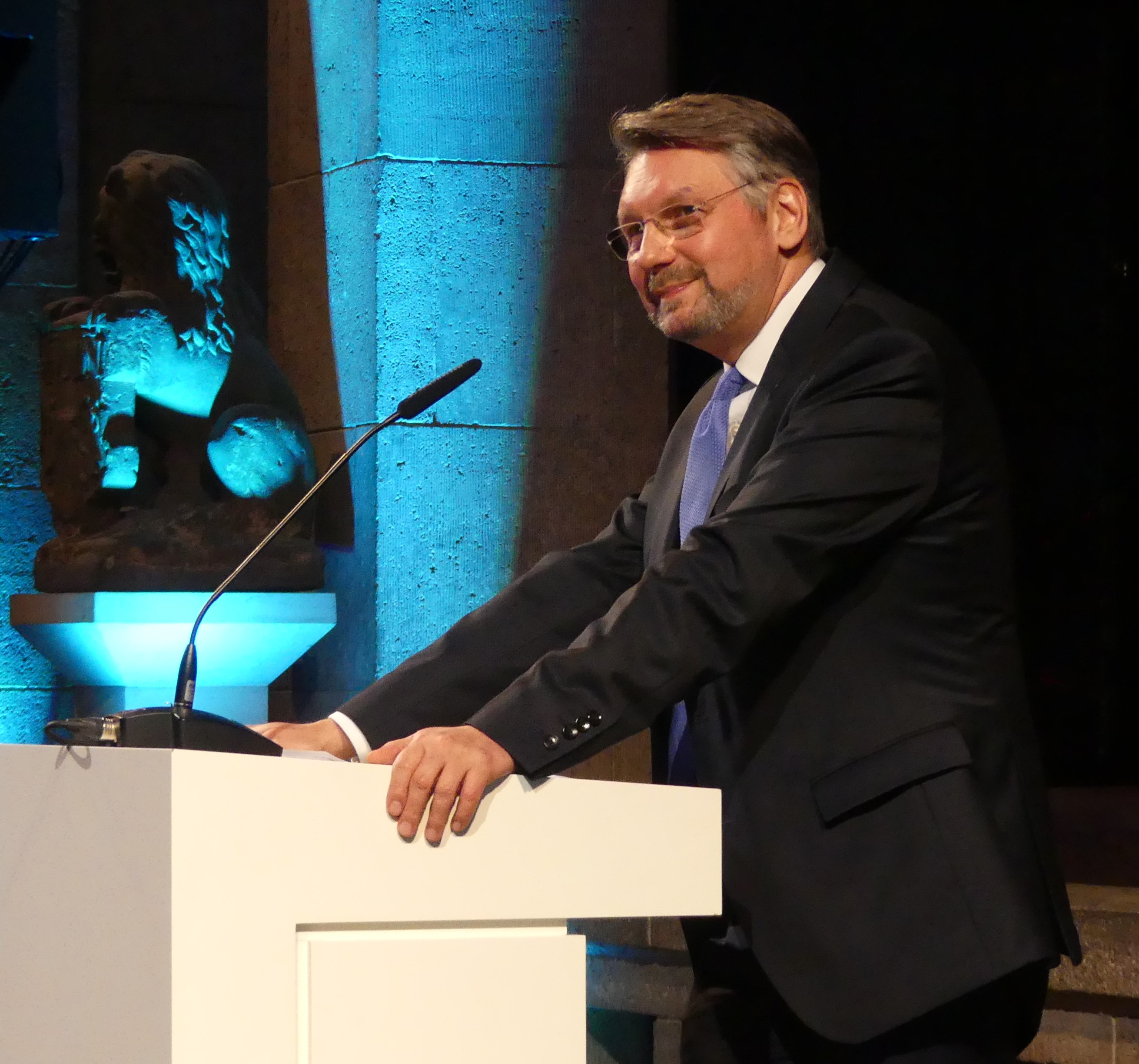 Prof. Dr. Hans-Jörg Czech, Eröffnung der Ausstellung „Christian Warlich auf St. Pauli“ am 26.11.2019 im Museum für Hamburgische Geschichte